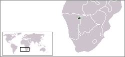 Description:Carte de localisation du bantoustan du Bushmenland, Namibie Auteur:Rémih